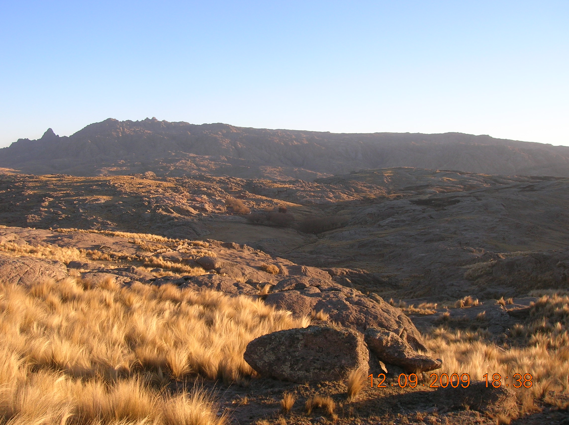 Vista de Los Gigantes desde la ruta Prov. 28